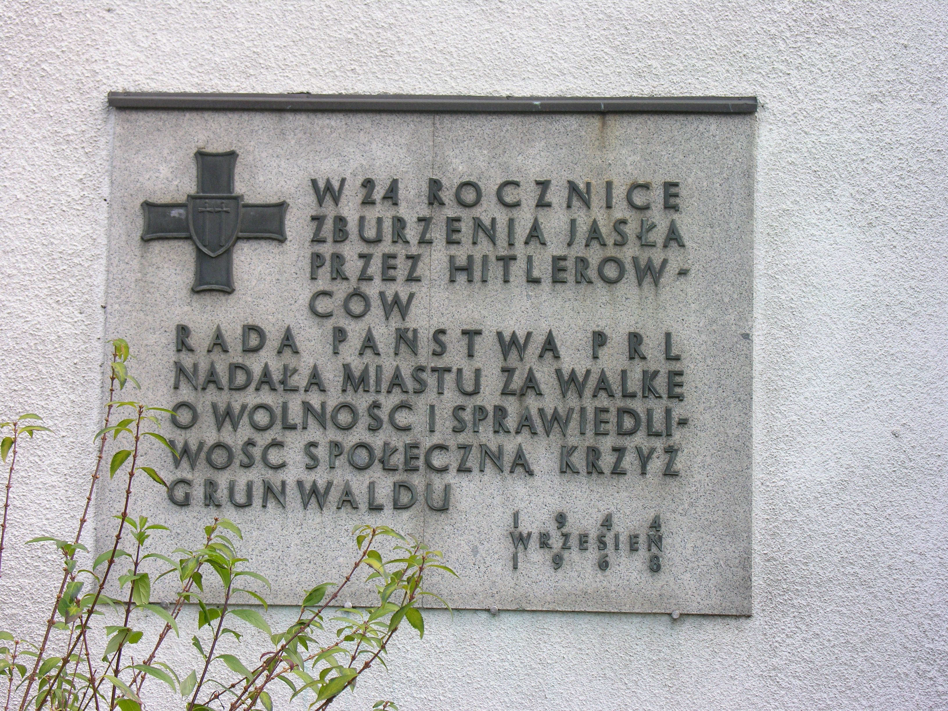 Tablica pamiątkowa na ratuszu w Jaśle